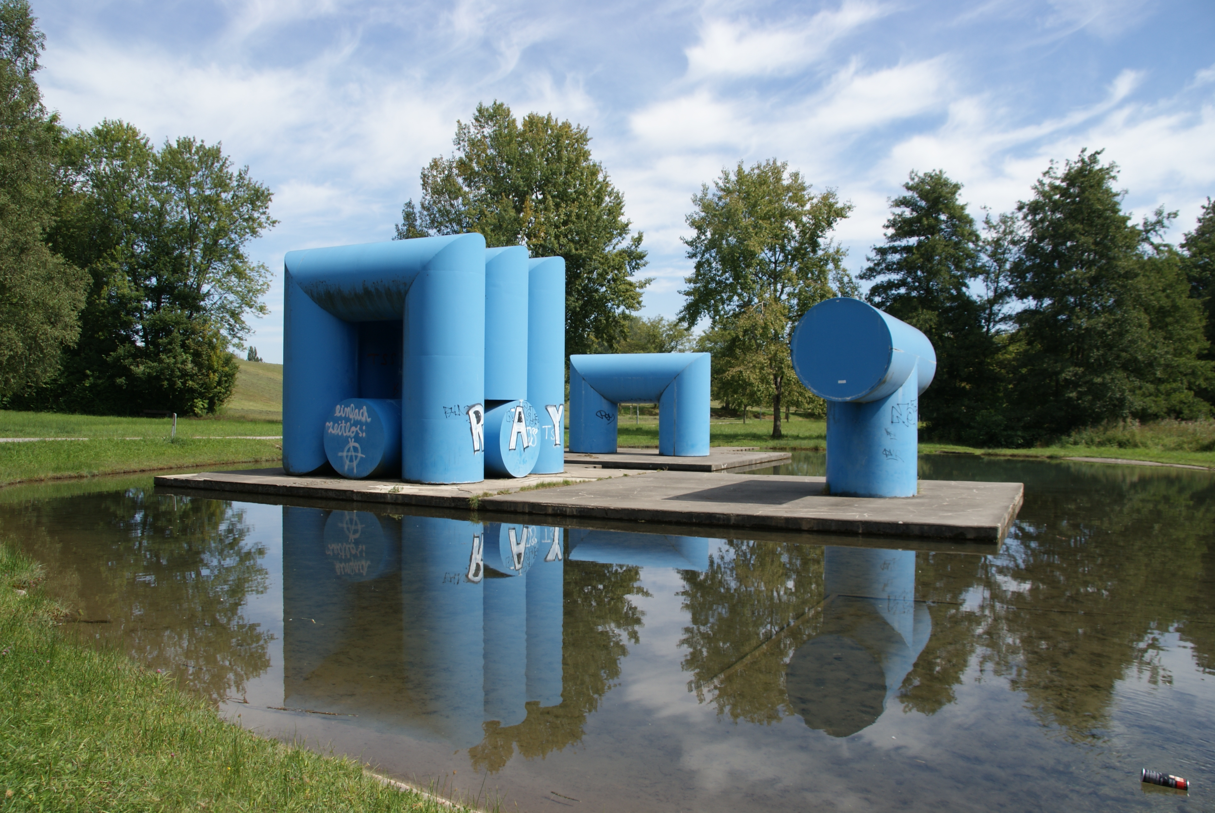 Friedrich Gräsel, Röhrenplastiken, Glasfaserverstärkter Polyester / Stahlblech, Hockgraben, Universität Konstanz